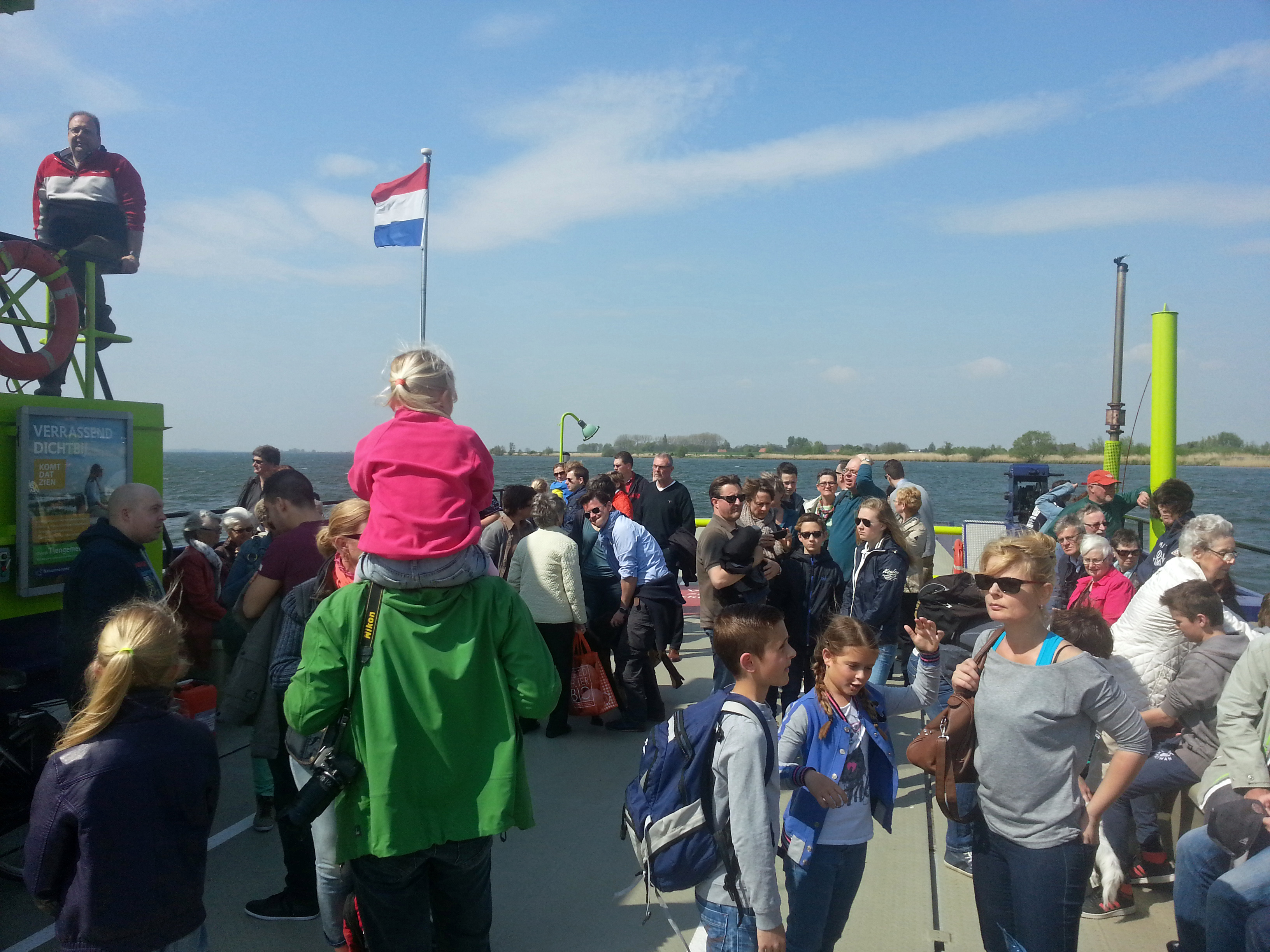 Voetgangers op het veerpont St. Antonius over het Vuile Gat op weg naar het eiland Tiengemeten